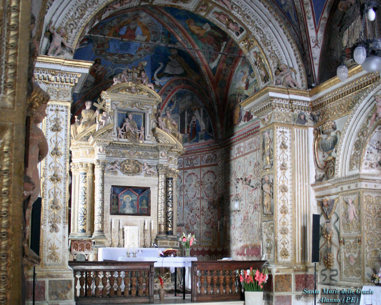 Alanno Chiesa di Santa Maria delle Grazie, Italy